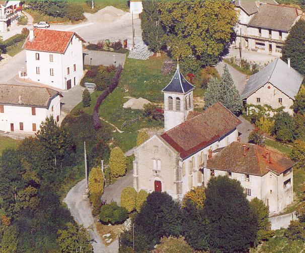 Chef lieu de Choisy. Vue aérienne.